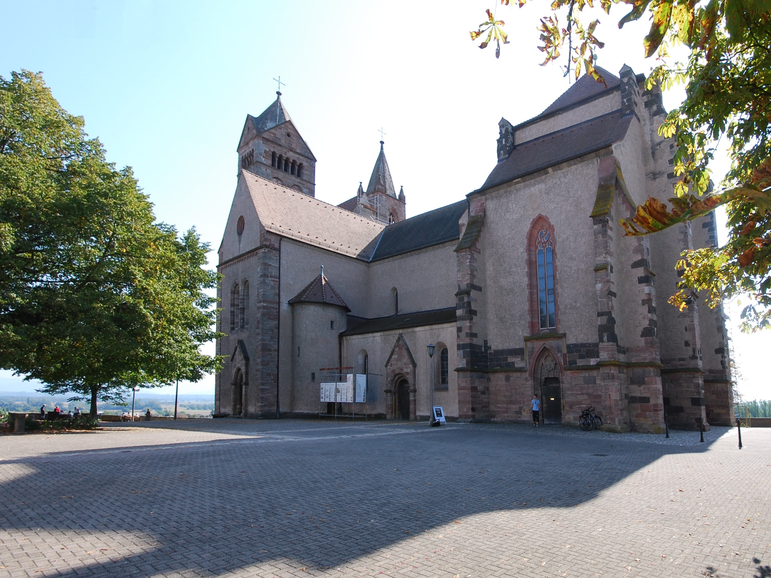 Breisacher Münster (Gesamtansicht)